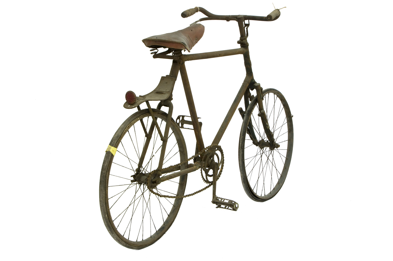 Bicicletta militare con telaio tubolare fisso a trapezio in metallo, con parziale presenza dell'originale verniciatura grigioverde; sulla ruota posteriore è situato il parafango portamantellina, sul quale è stato successivamente applicato un catadiottro. La bicicletta è provvista di molleggi sul telaio e sulla forcella: la forcella è molleggiata per mezzo di leve oscillanti e molle cilindriche, mentre il telaio presenta un molleggio con foglio di balestra e molla cilindrica in corrispondenza del nodo di sella. La bicicletta monta una sella, non originale, in pelle con due molle posteriori. Il manubrio dritto presenta impugnature rivolte verso l'alto e manopole in legno; nella parte sinistra del manubrio è collocata la leva che comanda il freno a ganasce sulla ruota anteriore. Il funzionamento si basa su una trasmissione a catena sulla ruota posteriore, con un pignone a scatto fisso. La bicicletta appoggia su due ruote di uguale dimensione, provviste di 32 raggi tangenti e battistrada in gomma piena. Notizie storico-critiche Fin dal suo apparire, la bicicletta ha richimato l'interesse dell'industria militare, in particolare a scopi ausiliari e di trasporto leggero. Già nel 1866, l'esercito italiano, tra i primi al mondo, adottò quattro veicoli per ogni reggimento di fanteria, destinati ai portaordini e agli esploratori. Con lo scoppio del primo conflitto mondiale, la Bianchi si assicurò varie commesse di fornitura militare tra le quali vi era la realizzazione di una bicicletta militare in dotazione ai battaglioni dei bersaglieri. Questa bicicletta, con telaio e forcella elastici, era allestita in tre diverse versioni: con portafucile, portamitragliatrice e porta cavalletto per mortai.